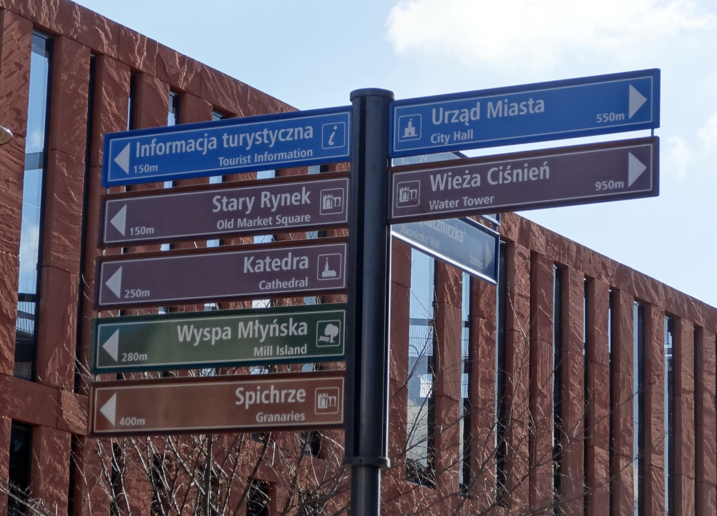 Kierunkowskazy na Starym Mieście w Bydgoszczy